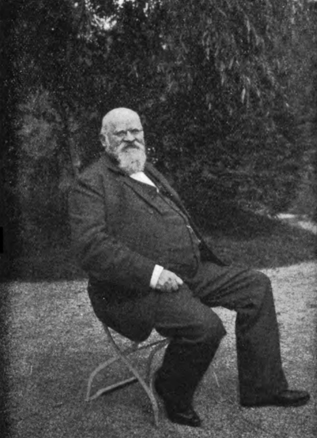 Hornjoserbsce: Jan Awgust Pohonč (1841–1909); wučer, hłowny zastupjer Gothaskeje žiwjenjezawěsćaceje banki w Lipsku a serbski spisowaćel.